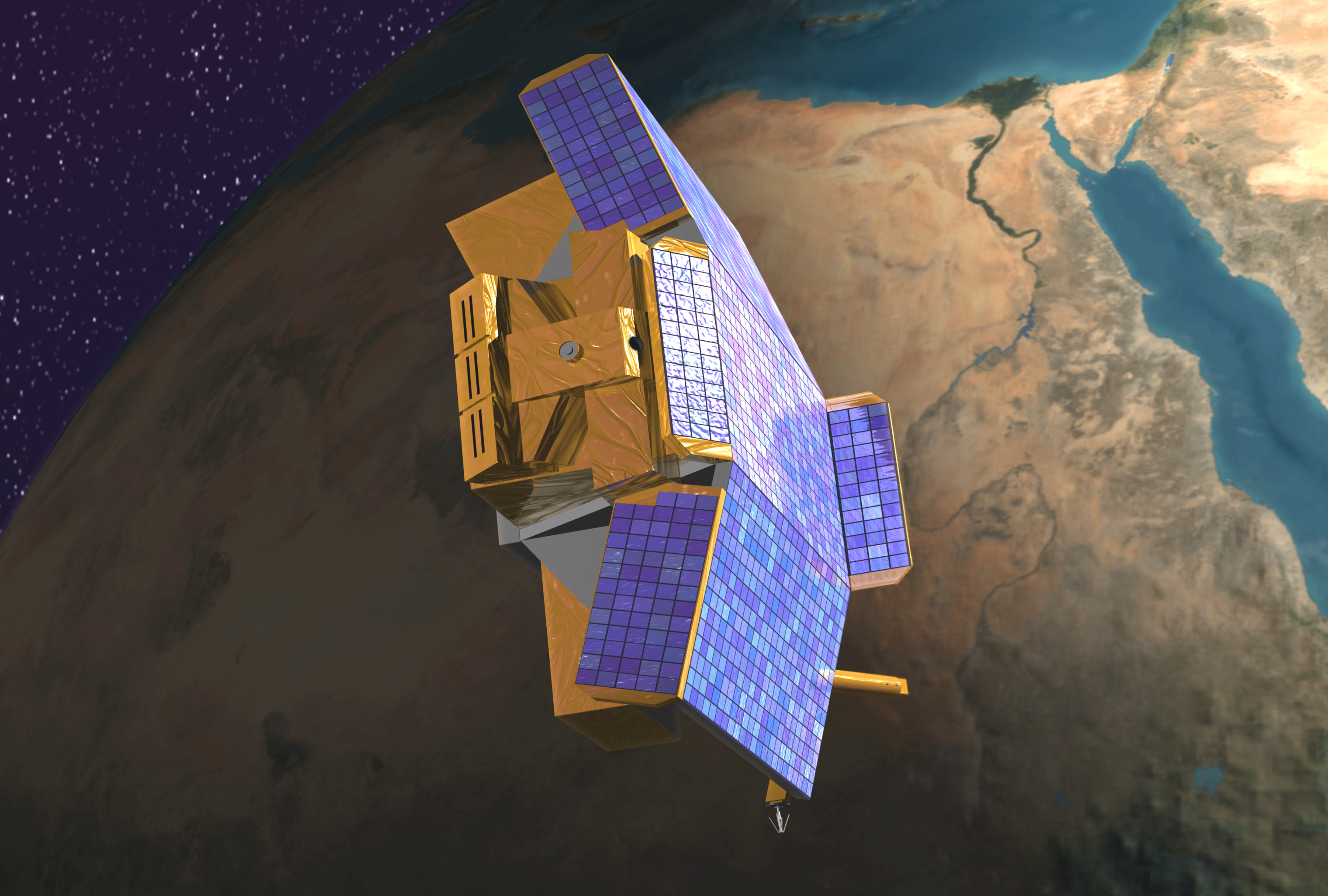 CHIPSAT satellite